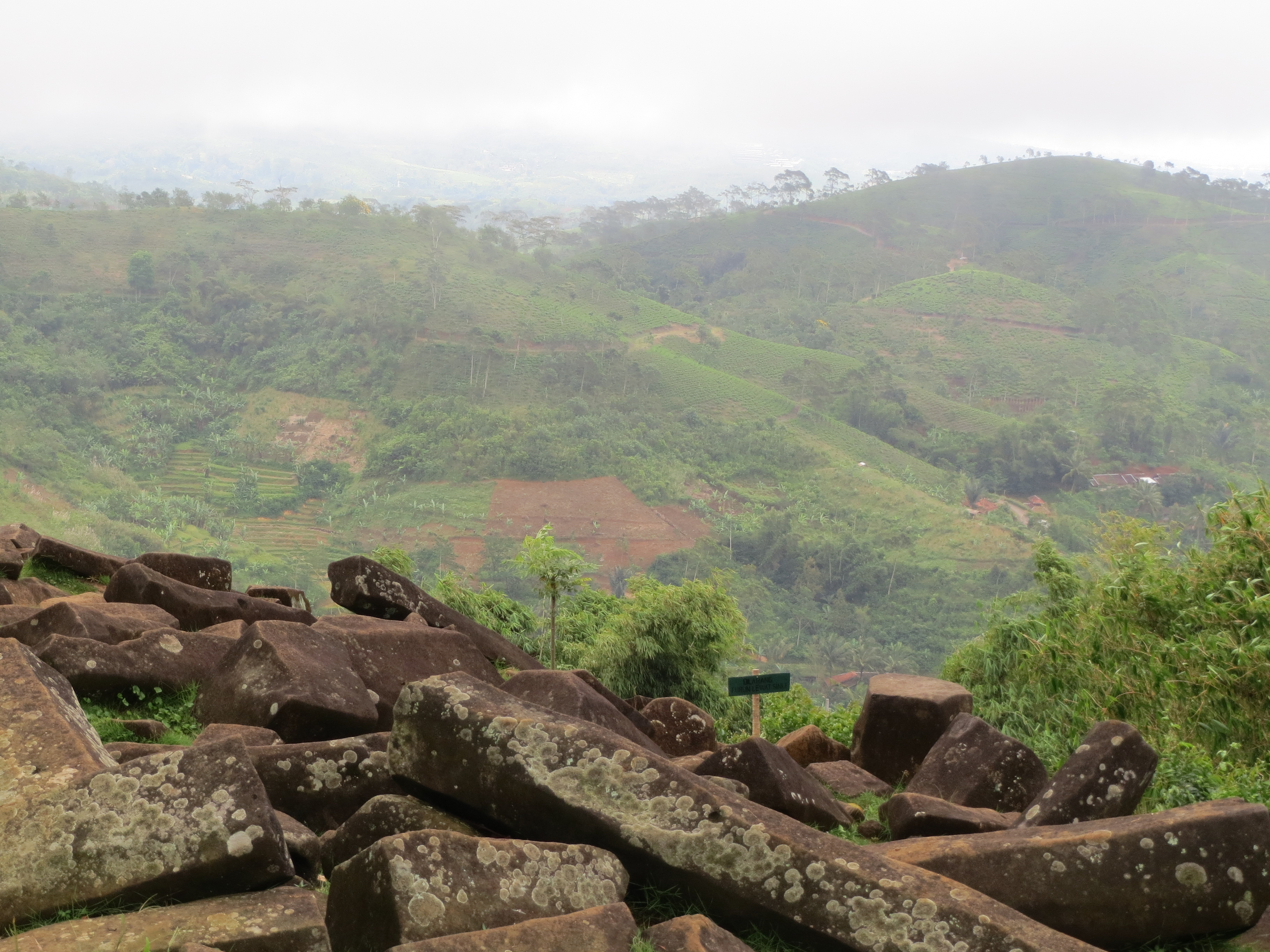 Pemandangan di sekitar Gunung Padang, sebuah situs megalitik di Jawa Barat.